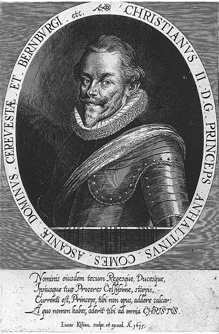 Christian I. von Anhalt-Bernburg zeitgenössischer Kupferstich von 1615